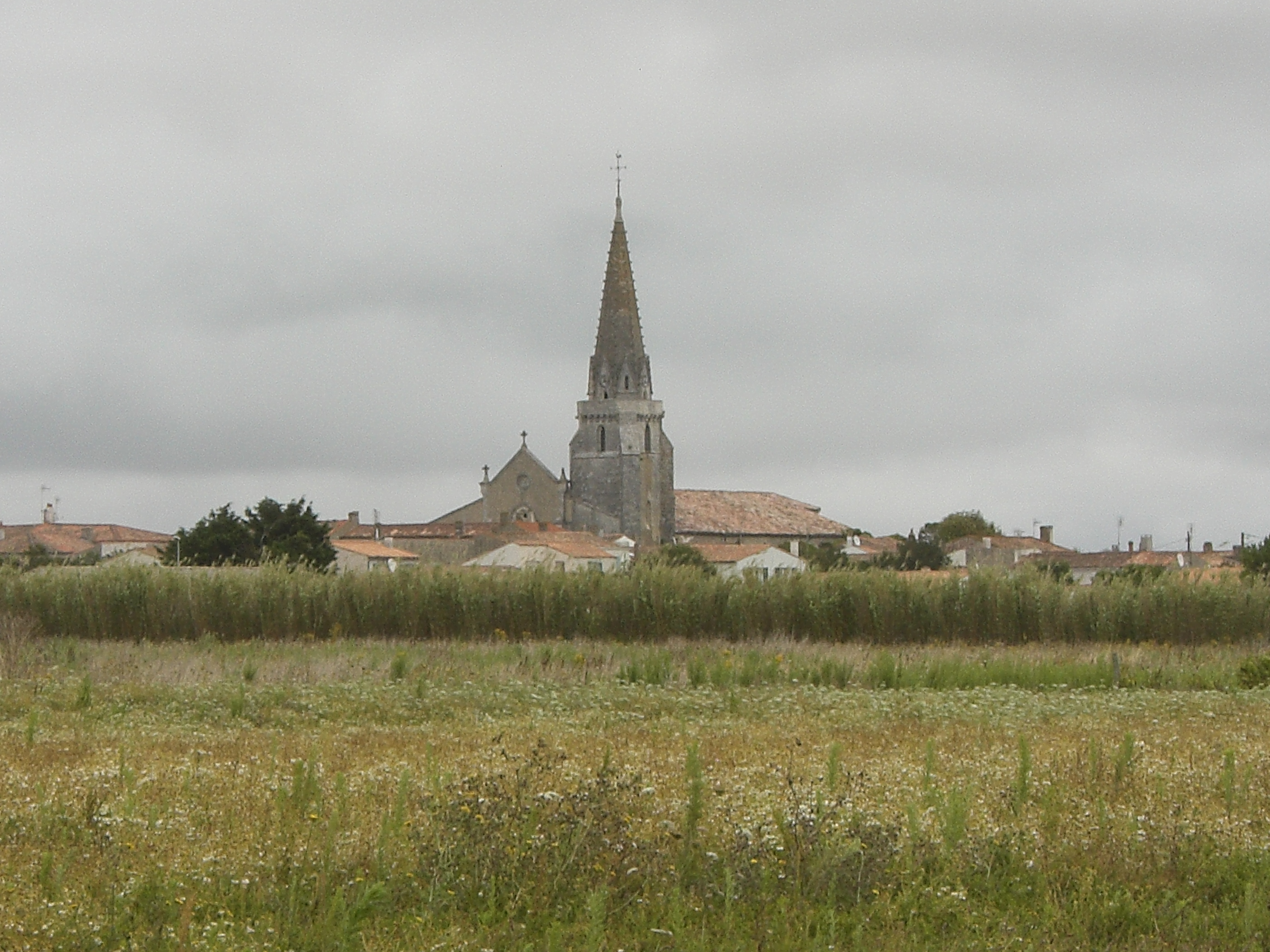 Clocher de l'église de Sainte-Marie, sur l'île de Ré. Le clocher date du XVe, le reste de l'église du XIXe